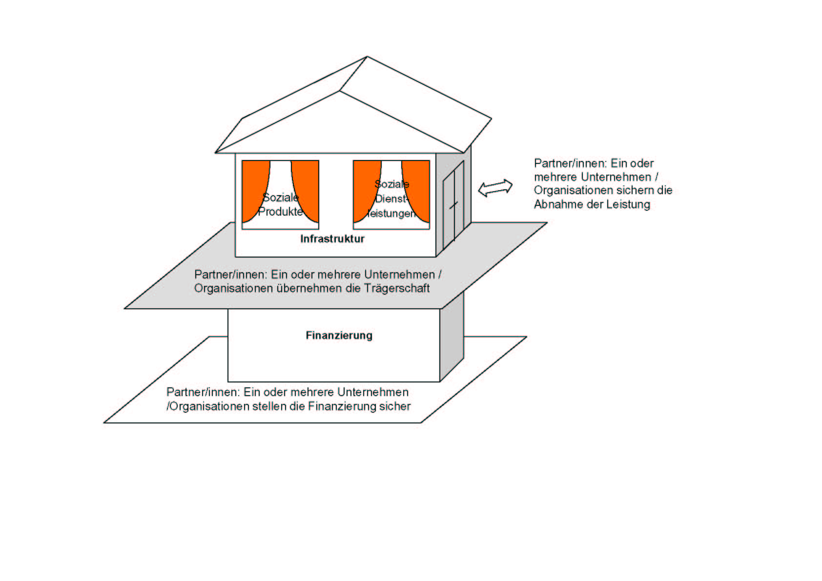 systemische Beschreibung von Public Social Private Partnership, author: Manfred Leonhardt, Rainer Loidl-Keil, Peter Wilhelmer, Andreas Thomasser, Brigitte Kukovetz